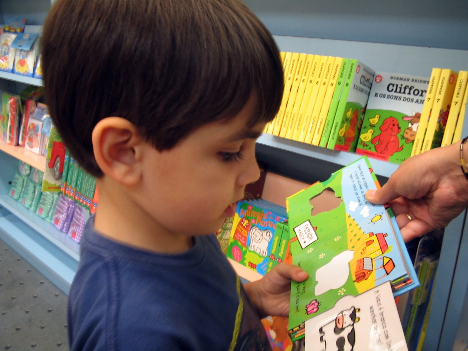 João Vítor